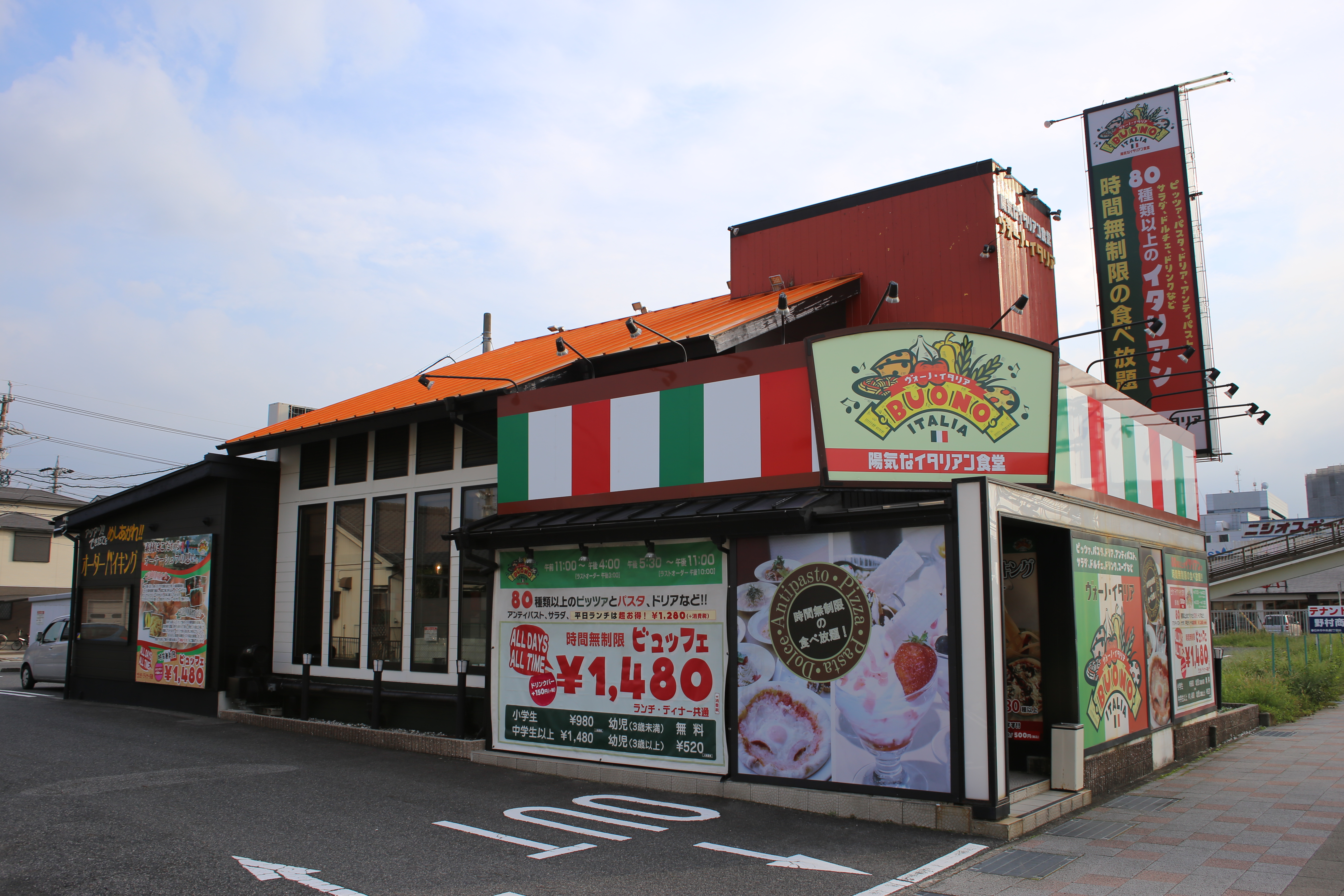 愛知県春日井市のヴォーノ・イタリア春日井店